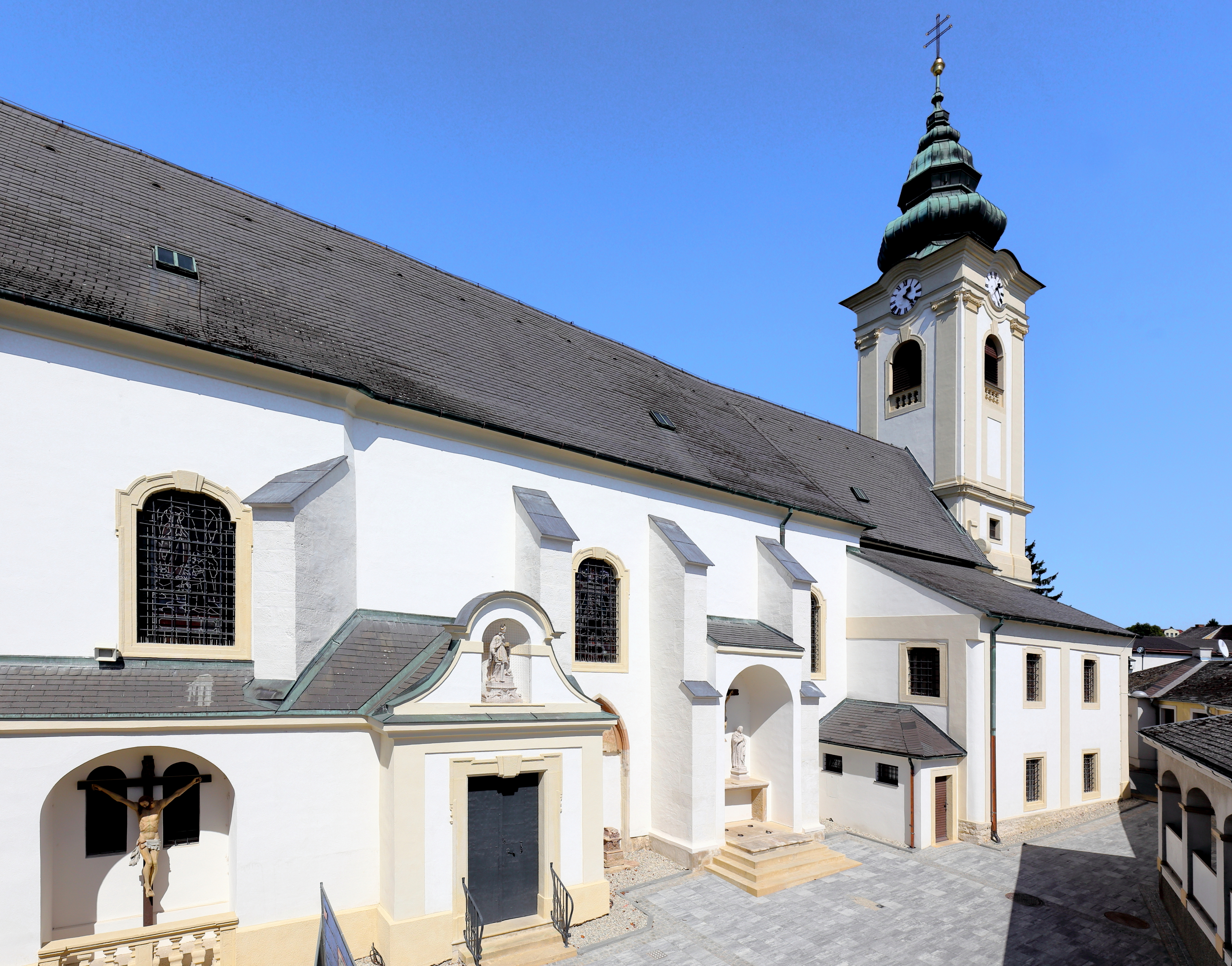 Südwestansicht der röm.-kath. Pfarrkirche hll. Nikolaus und Gallus in der burgenländischen Bezirkshauptstadt Neusiedl am See.Die Kirche wurde im 15. Jahrhundert in erhöhter Lage errichtet und im Laufe der Jahre mehrfach erweitert bzw. umgebaut. Der jetzige Kirchturm mit dem Zwiebelhelm wurde 1737 errichtet, nachdem der Vorgängerturm desolat war und einstürzte.